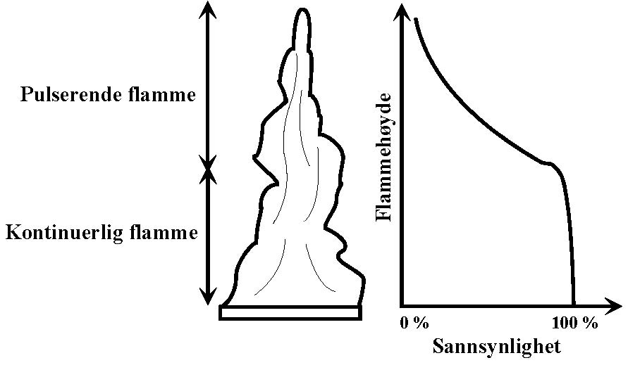 Viser hvordan sannsynligheten for flammens tilstedeværelse varierer med høyden i den pulserende sonen.